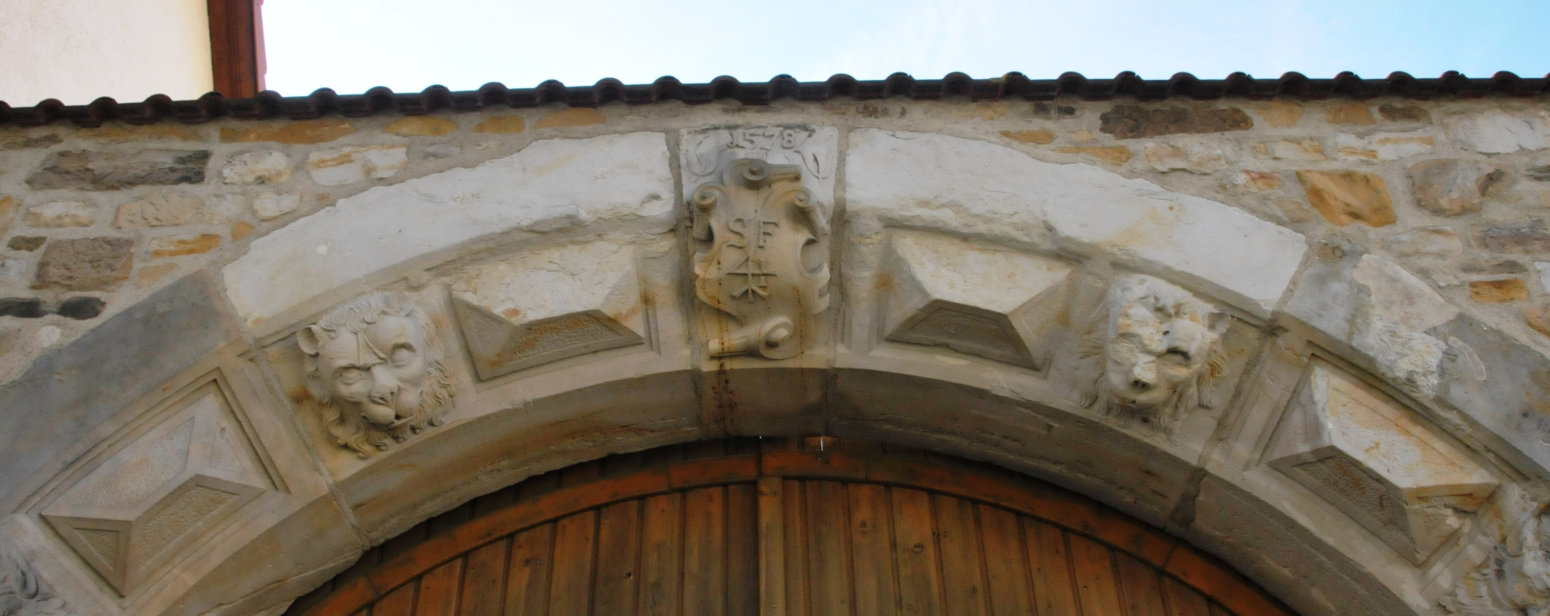 Pferdingsleben, Kirchstraße 60, Tor und Jahreszahl 1578 sowie die Initialen des damaligen Besitzers/Erbauers/Handwerkers und Zunftzeichen